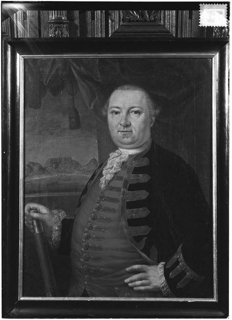 Porträt von Joachim van Plettenberg (1739-1793), Ölgemälde eines unbekannten Meisters